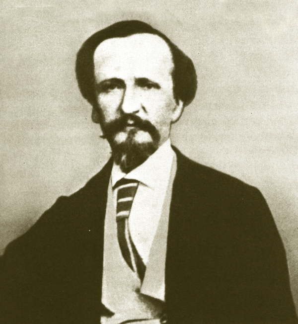 foto dell'Ottocento da [1]